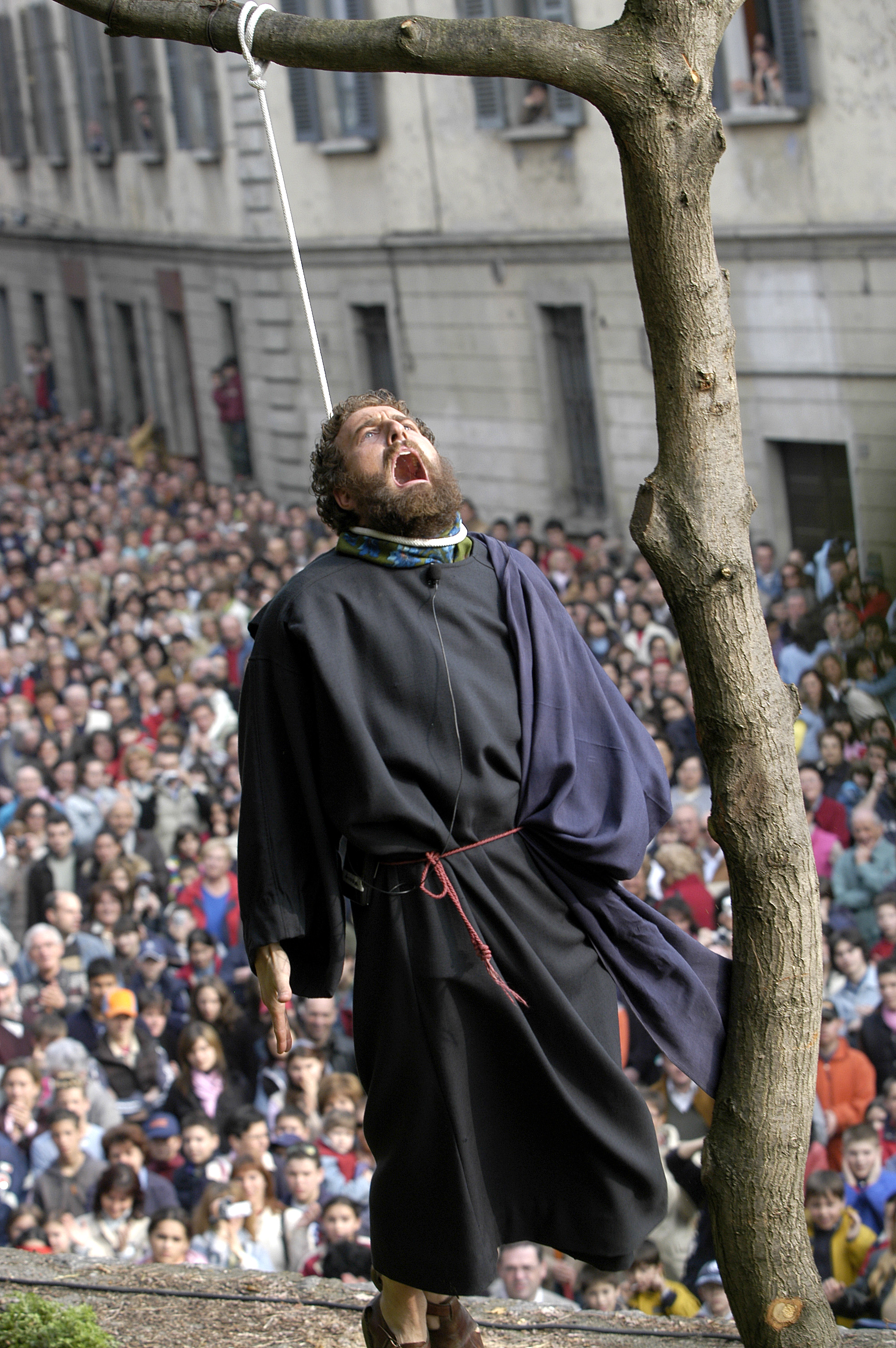 Sacra Rappresentazione